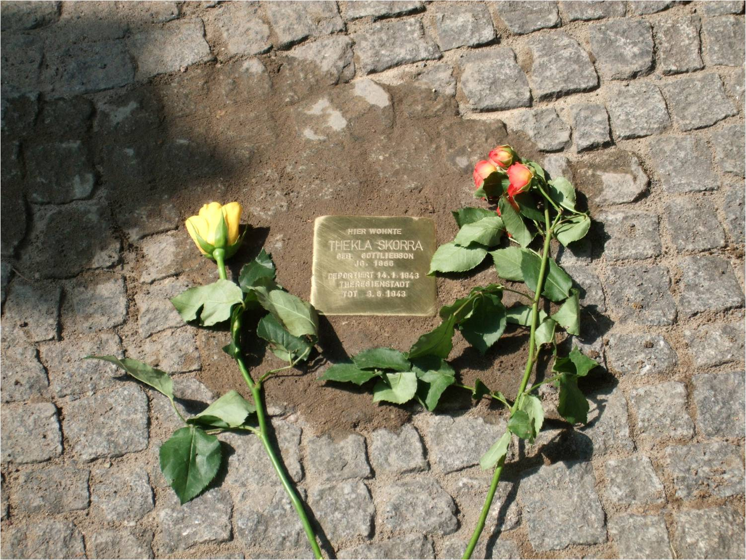 Stolpersteine, Thekla Skorra, Lietzenburger Straße 39, Berlin-Wilmersdorf, Deutschland